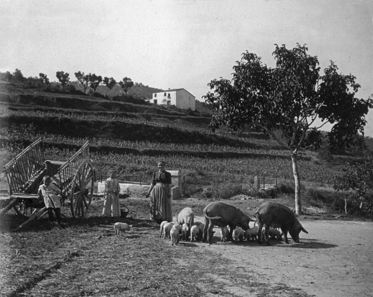 Museu etnològic del Montseny